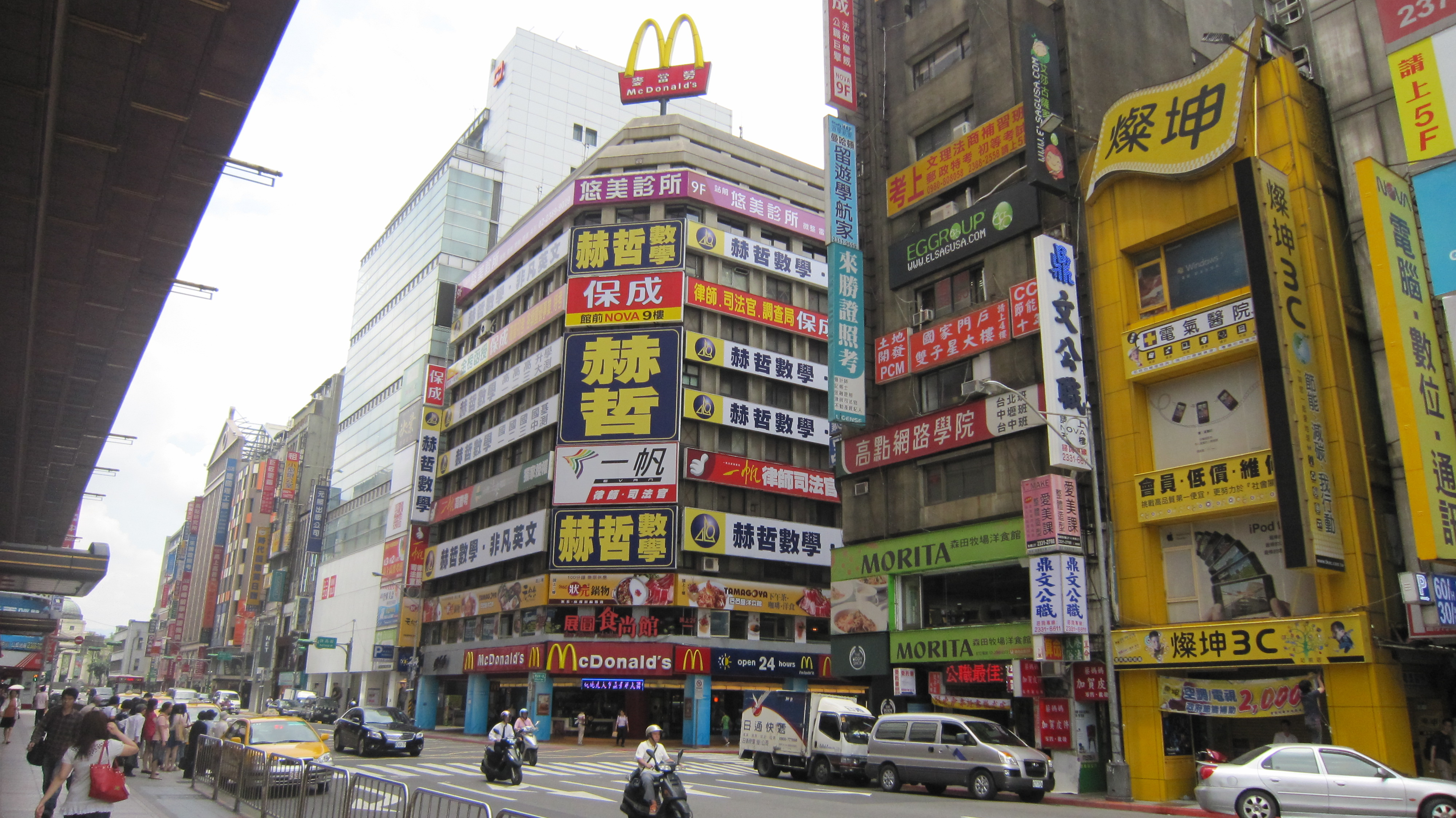 台北市館前路Guanqian St,Taipei City